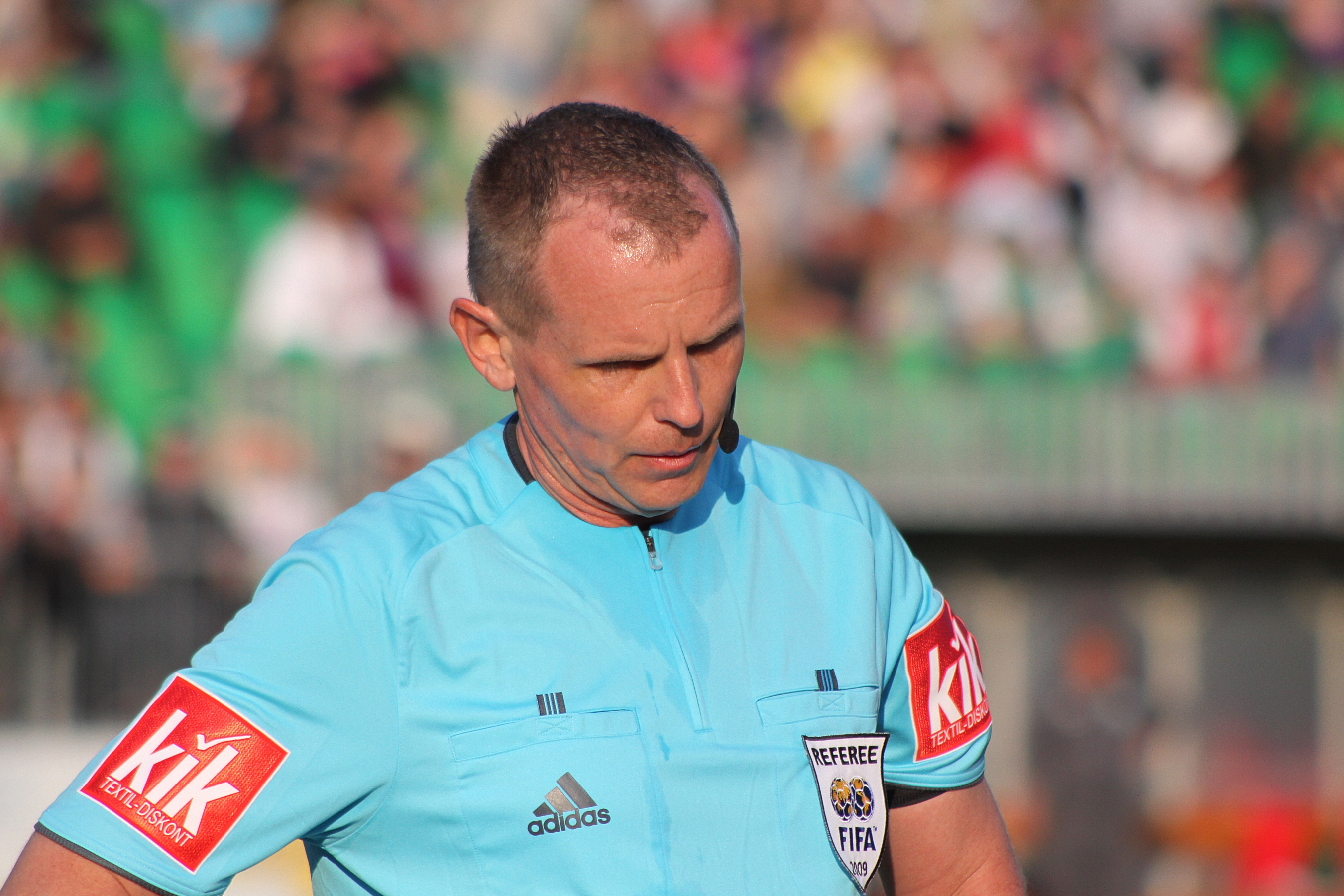 Fritz Stuchlik, österreichischer Fußballschiedsrichter im Bundesliga-Spiel SV Mattersburg gegen Kapfenberger SV (quer)